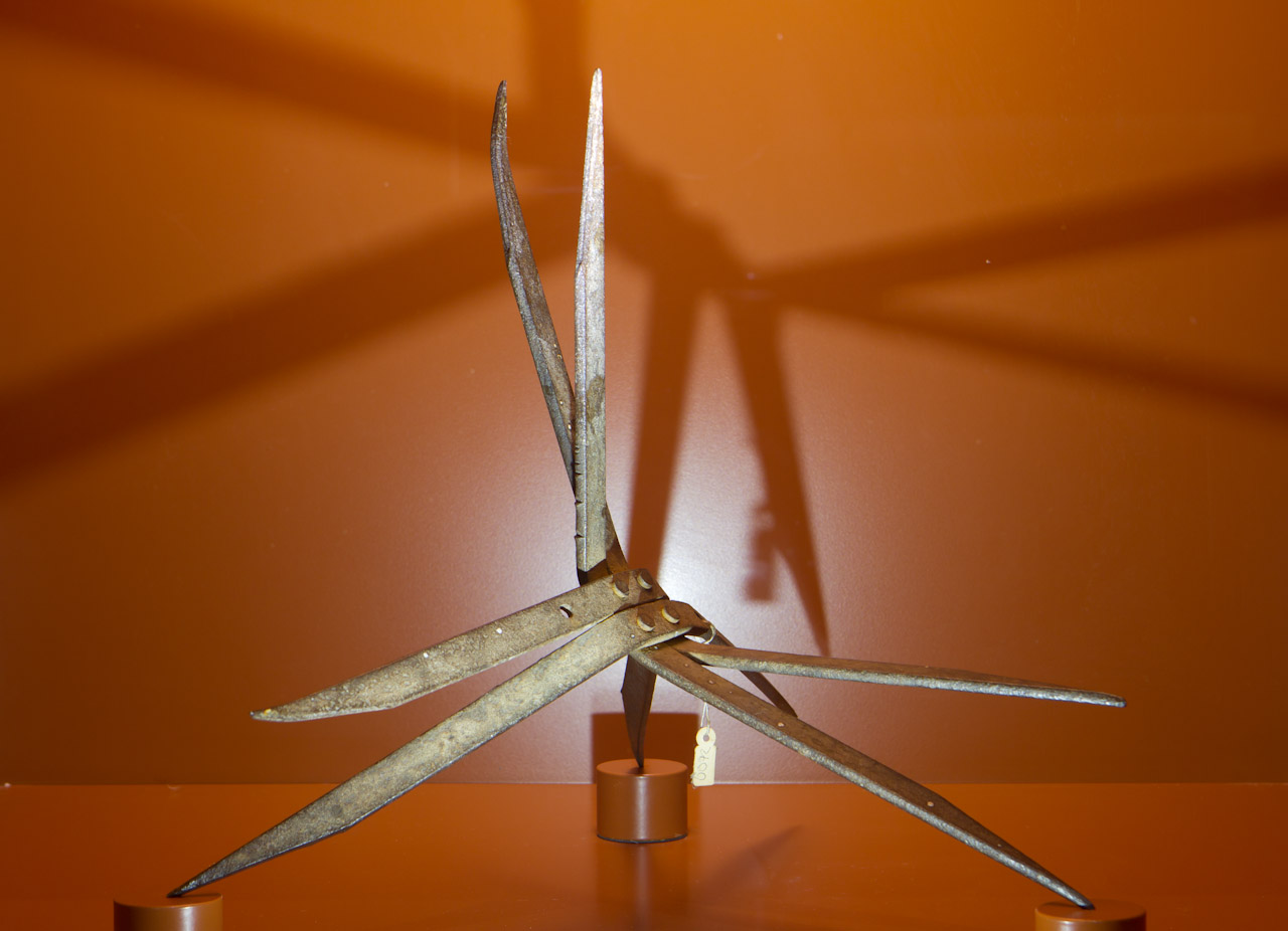 Tribolo presente al Museo della Battaglia di Vittorio Veneto.